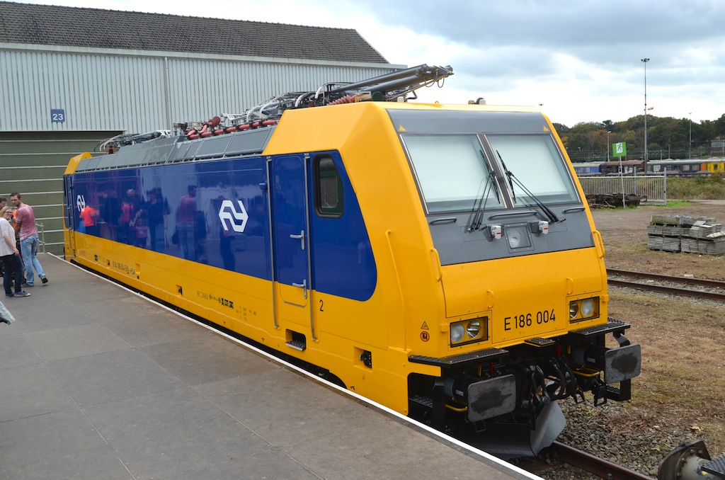 Spoorparade Amersfoort; loc E 186 004. Foto: Erik Swierstra.